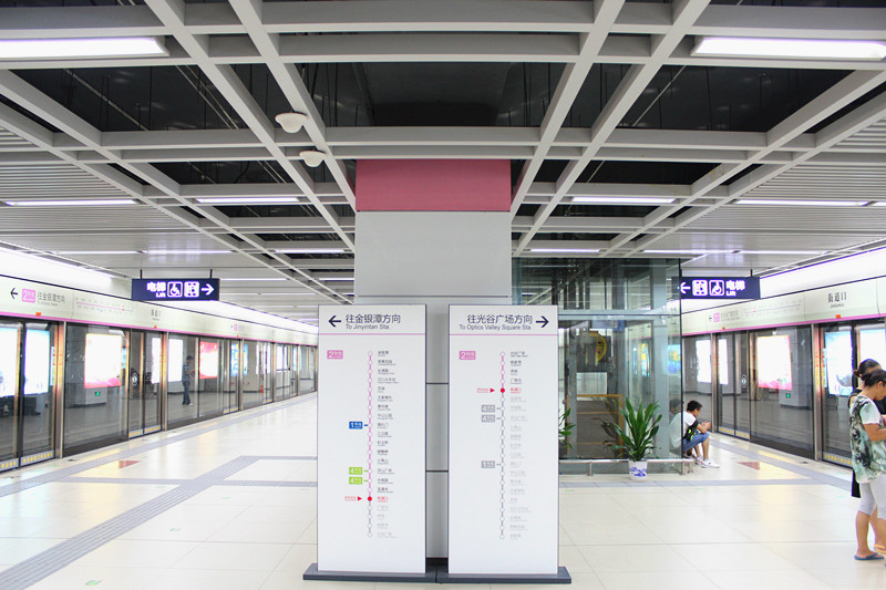 武汉地铁2号线